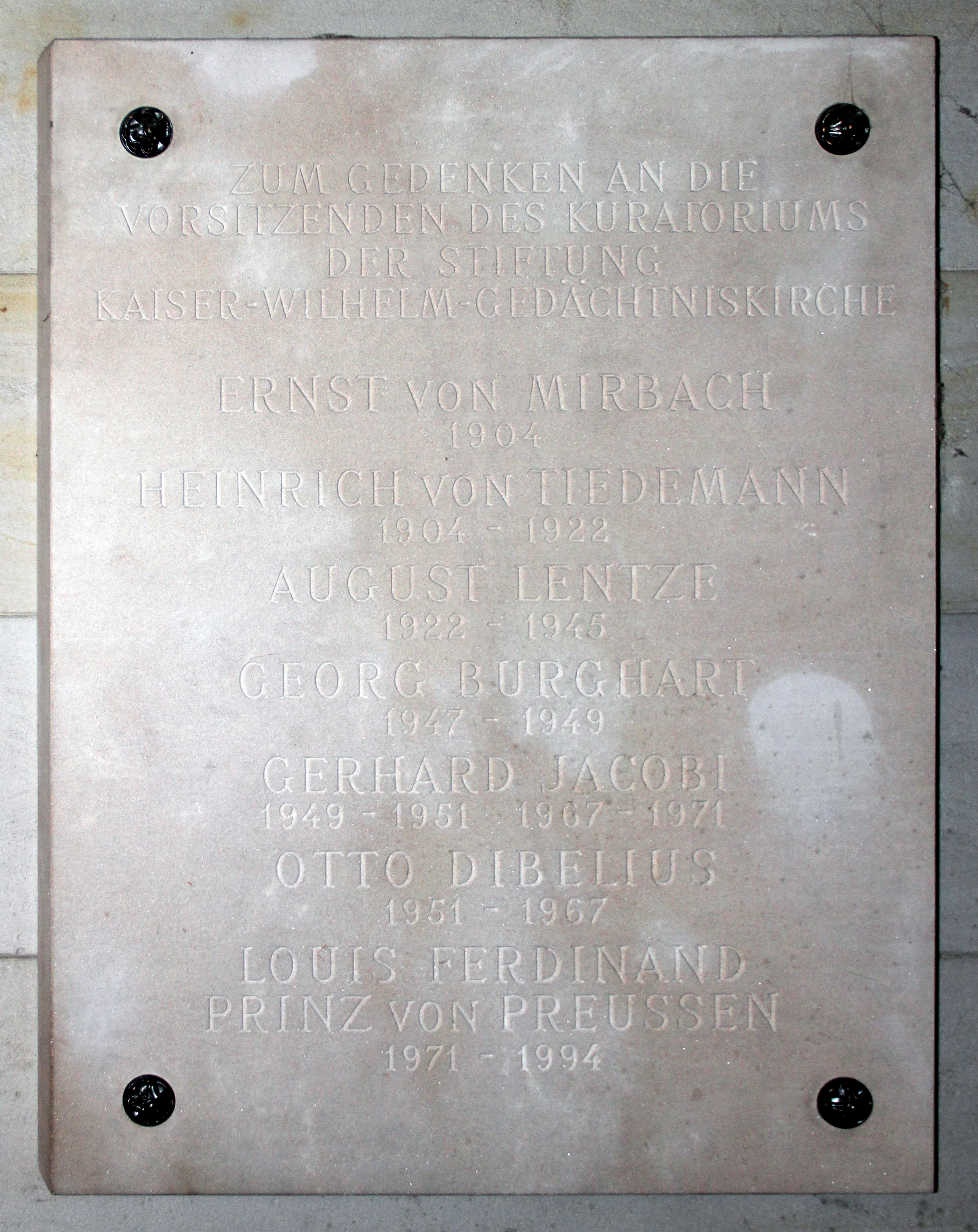 Gedenktafel, Kuratorium der Stiftung Kaiser-Wilhelm-Gedächtniskirche, Ernst von Mirbach, Heinrich von Tiedemann-Seeheim, August Lentze, Georg Burghart, Gerhard Jacobi, Otto Dibelius, Louis Ferdinand von Preußen, Breitscheidplatz, Berlin-Charlottenburg, Deutschland